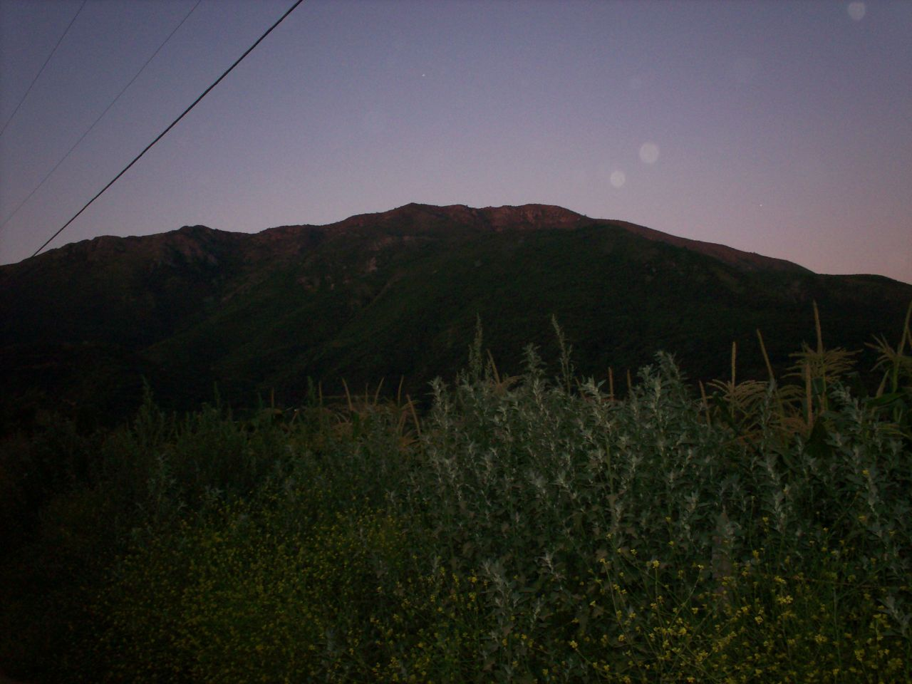 Cerro Horcón de Piedra, 3,000 metres (9,800 ft) de altura (aprox.), este es el cerro más alto de la Cordillera de la Costa en Chile. Cholqui, a 10 Km. de Melipilla, Región Metropolitana.